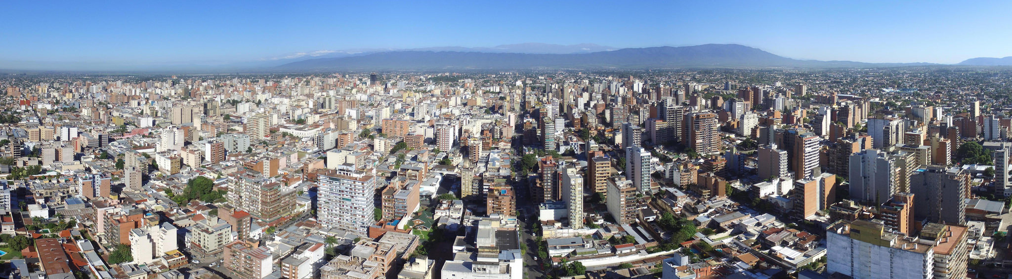 Vista panorámica del área central de San Miguel de Tucumán.